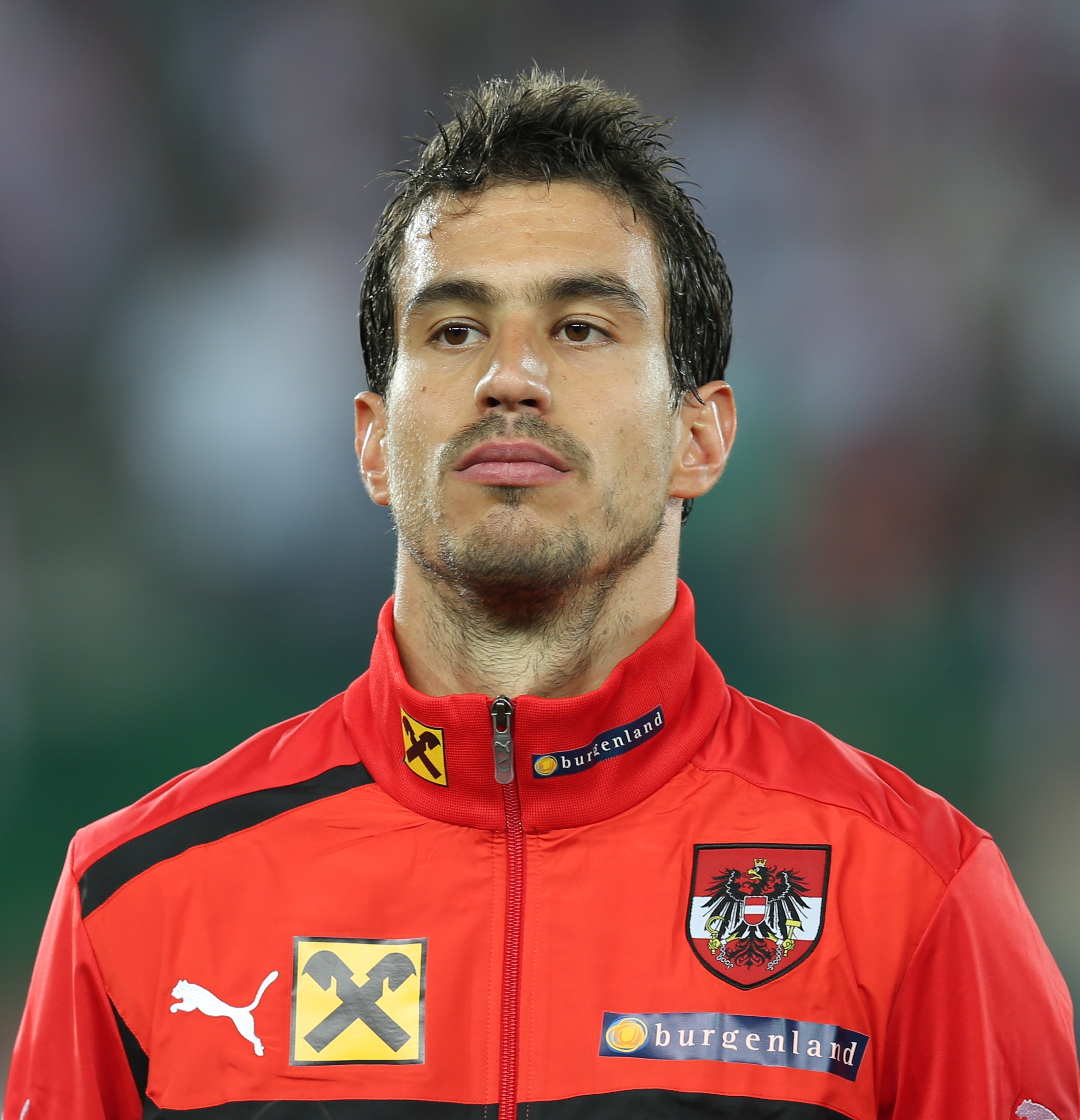 Fußball-Weltmeisterschaft 2014/Qualifikation (UEFA), Gruppe C, 11. September 2012, Österreich gegen Deutschland im Wiener Ernst-Happel-Stadion. The making of this work was supported by Wikimedia Austria. For other files made with the support of Wikimedia Austria, please see the category Supported by Wikimedia Österreich.